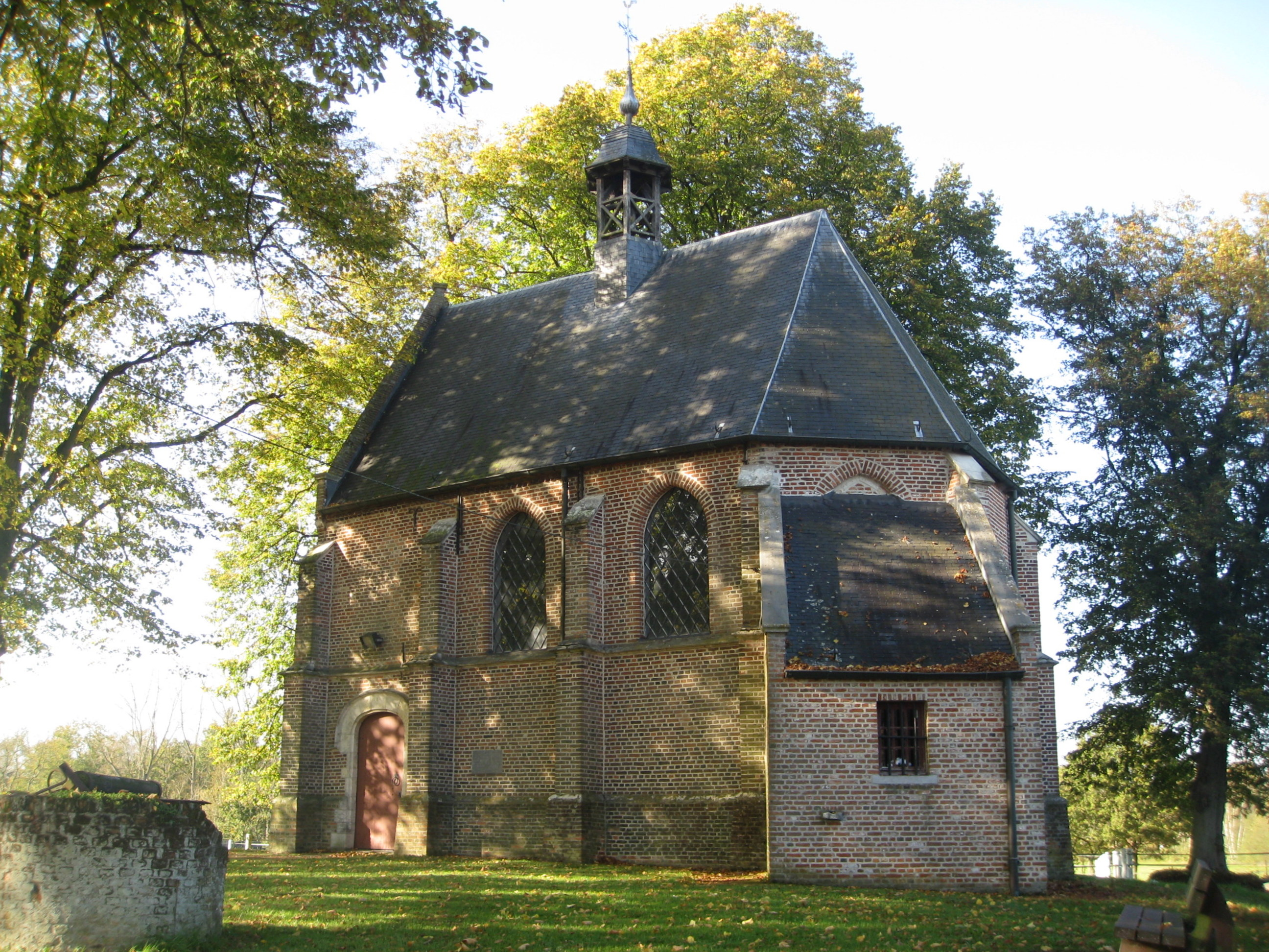 De Sint-Bavokapel is gesitueerd in de Trichelhoek in Eindhout